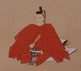 小堀政峯の肖像。